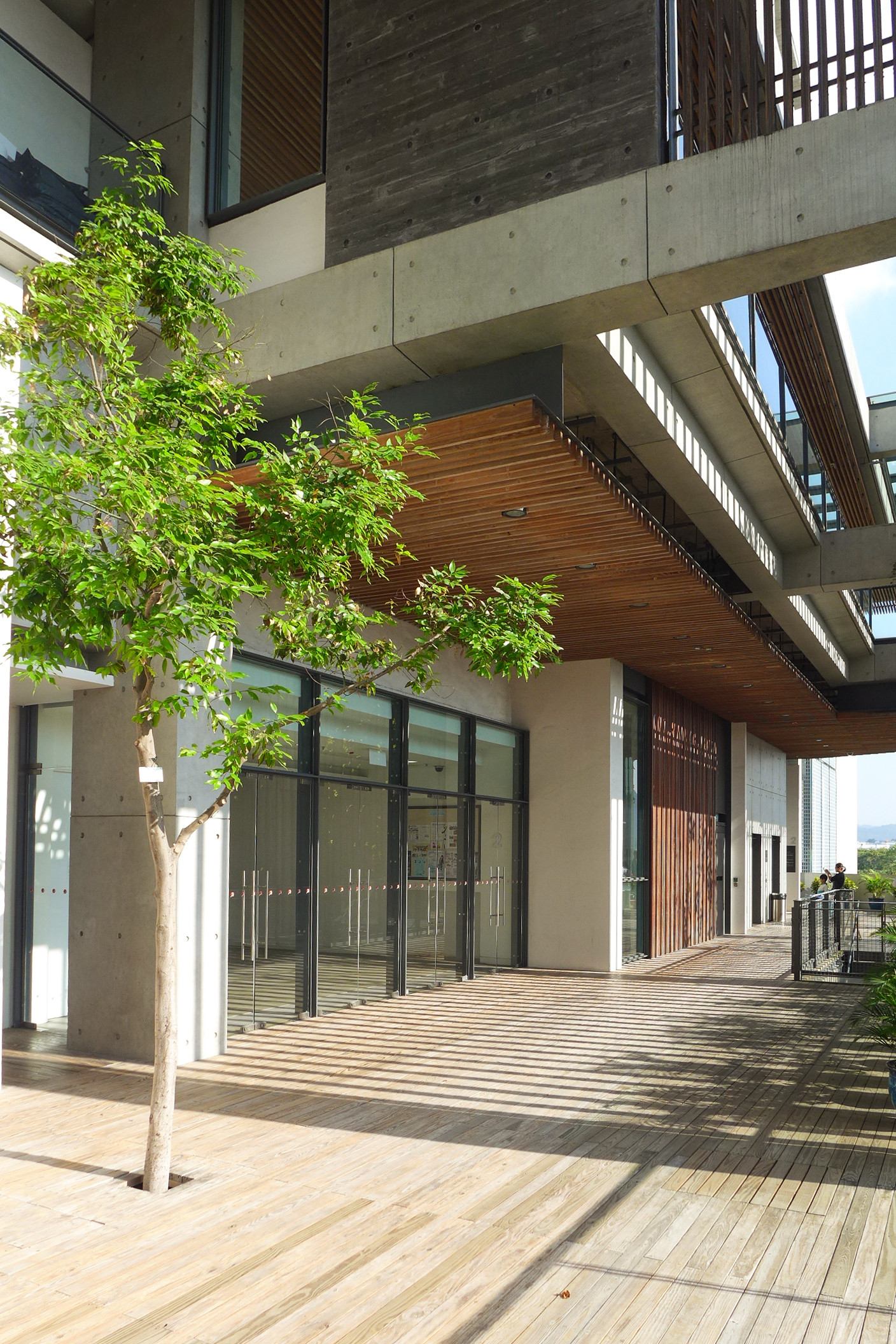 Ping Shan Tin Shui Wai Sports Centre Level 2 Outdoor Garden